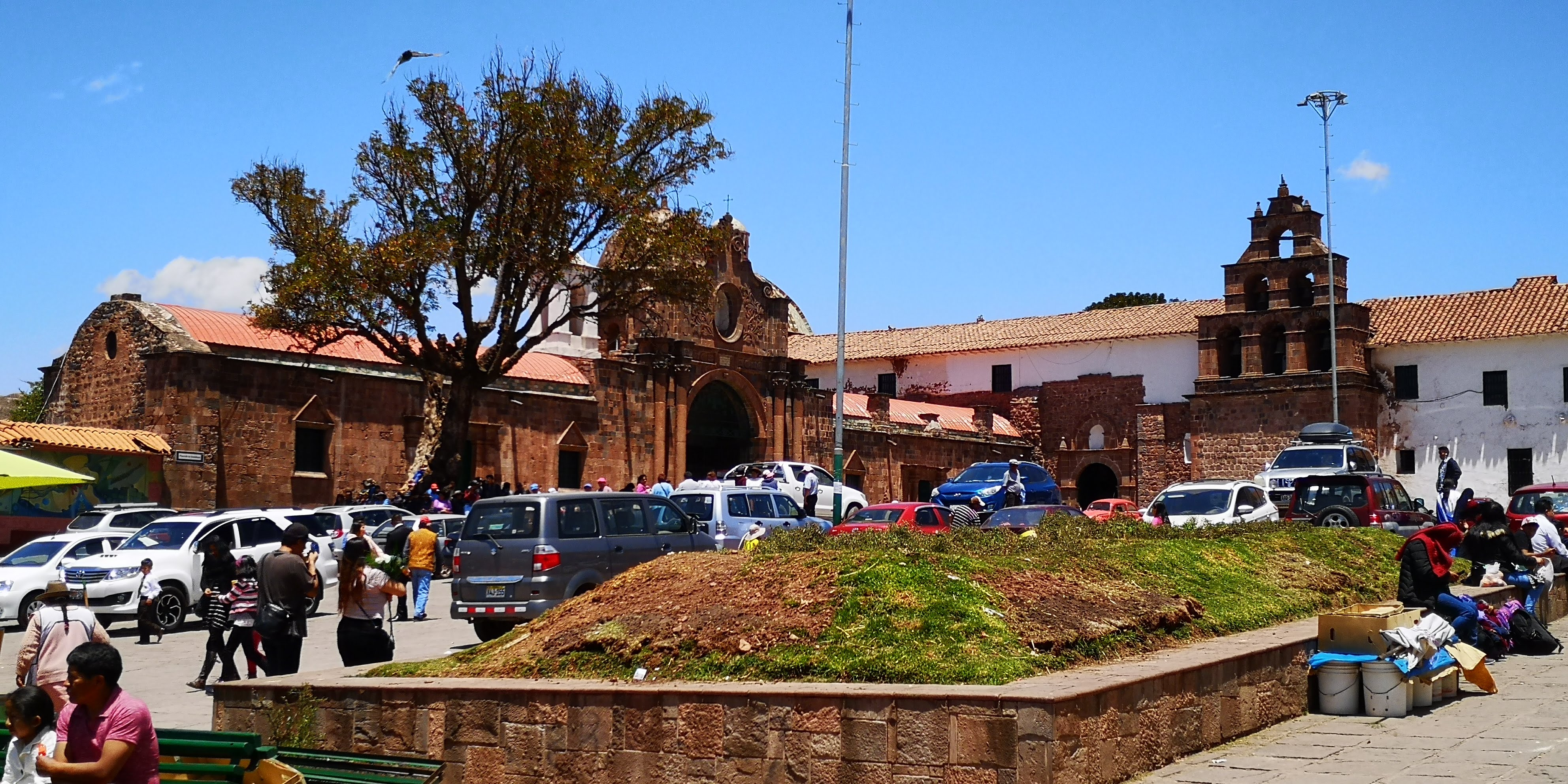 Vista de la Plazoleta Almudena (Cementerio a la izquierda y templo a la derecha) del templo en Cusco, Perú.